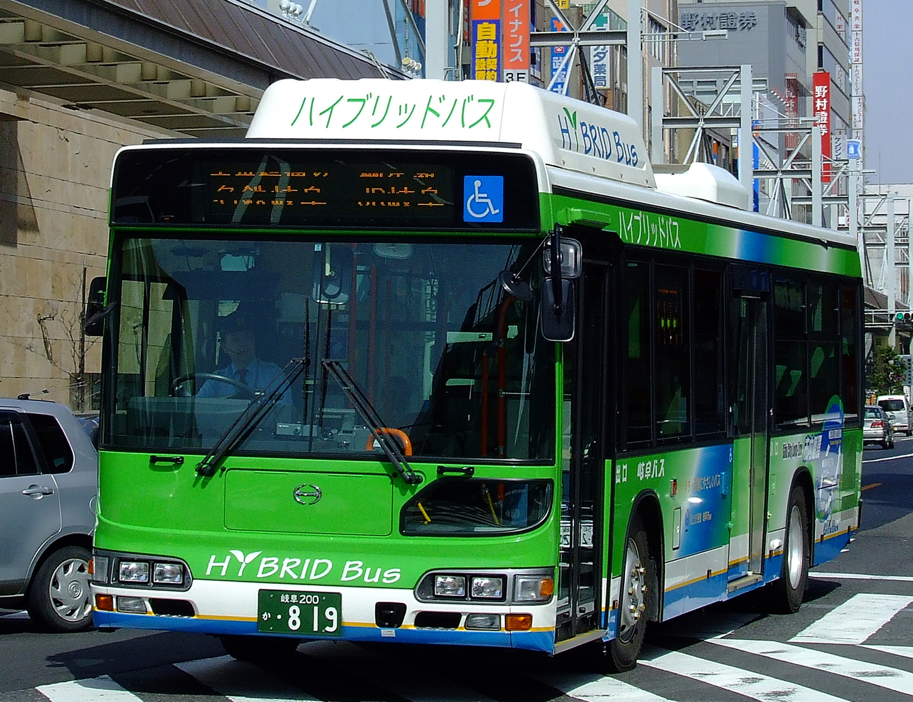 岐阜乗合自動車（岐阜バス）の路線バス車両（日野・ブルーリボンシティハイブリッド） 名鉄岐阜付近にて